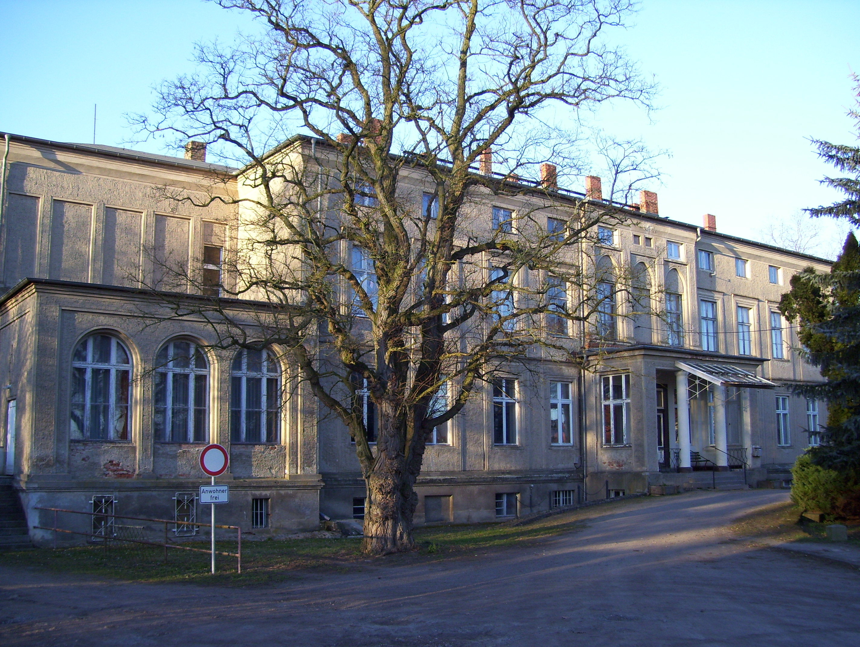 Janow, Herrenhaus, Hofseite (Südseite)